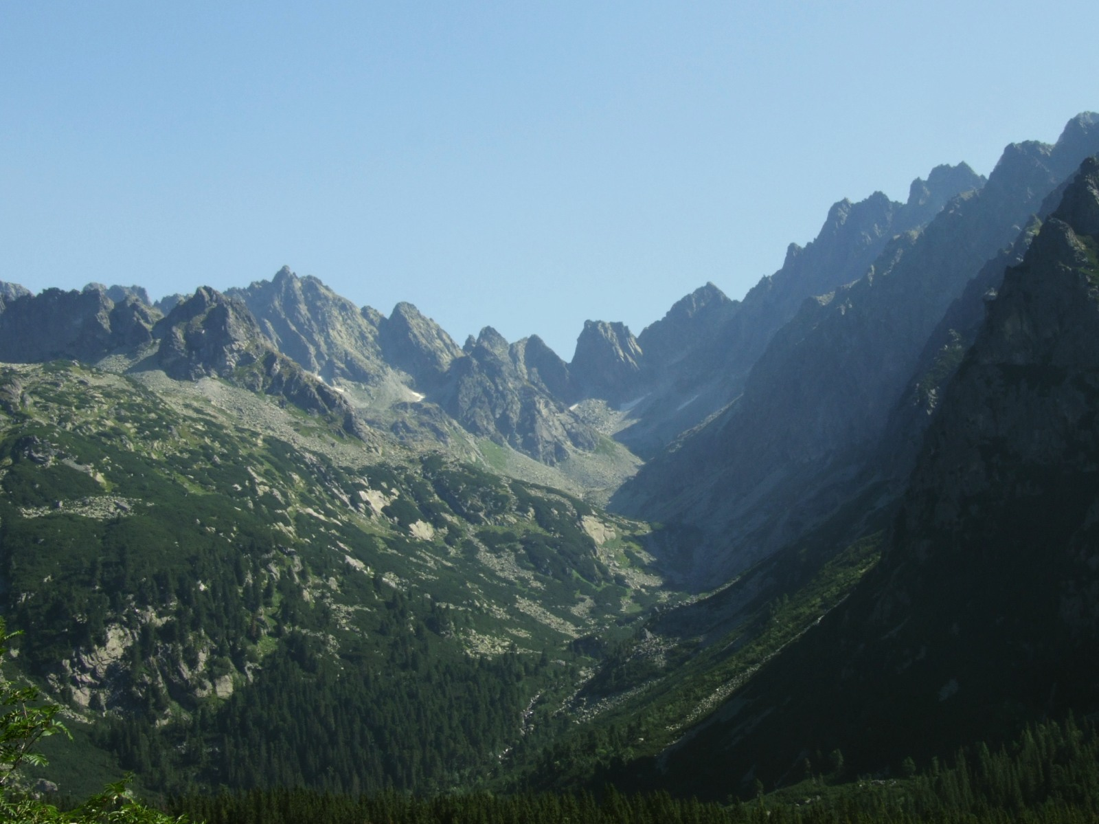 Dolina Złomisk. Widok z zboczy Patrii